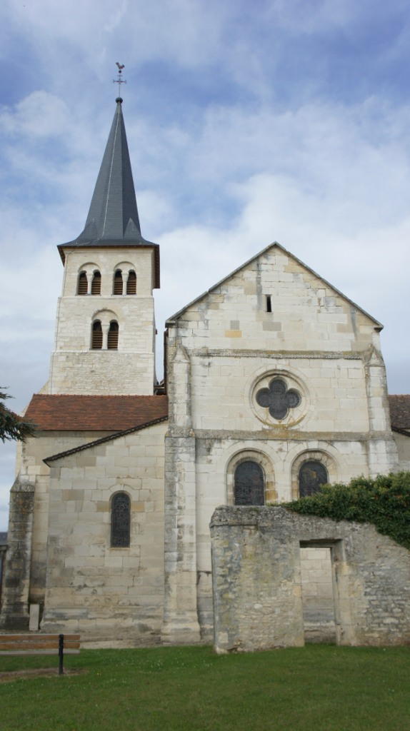 église d'Hermonville vue de l'est.